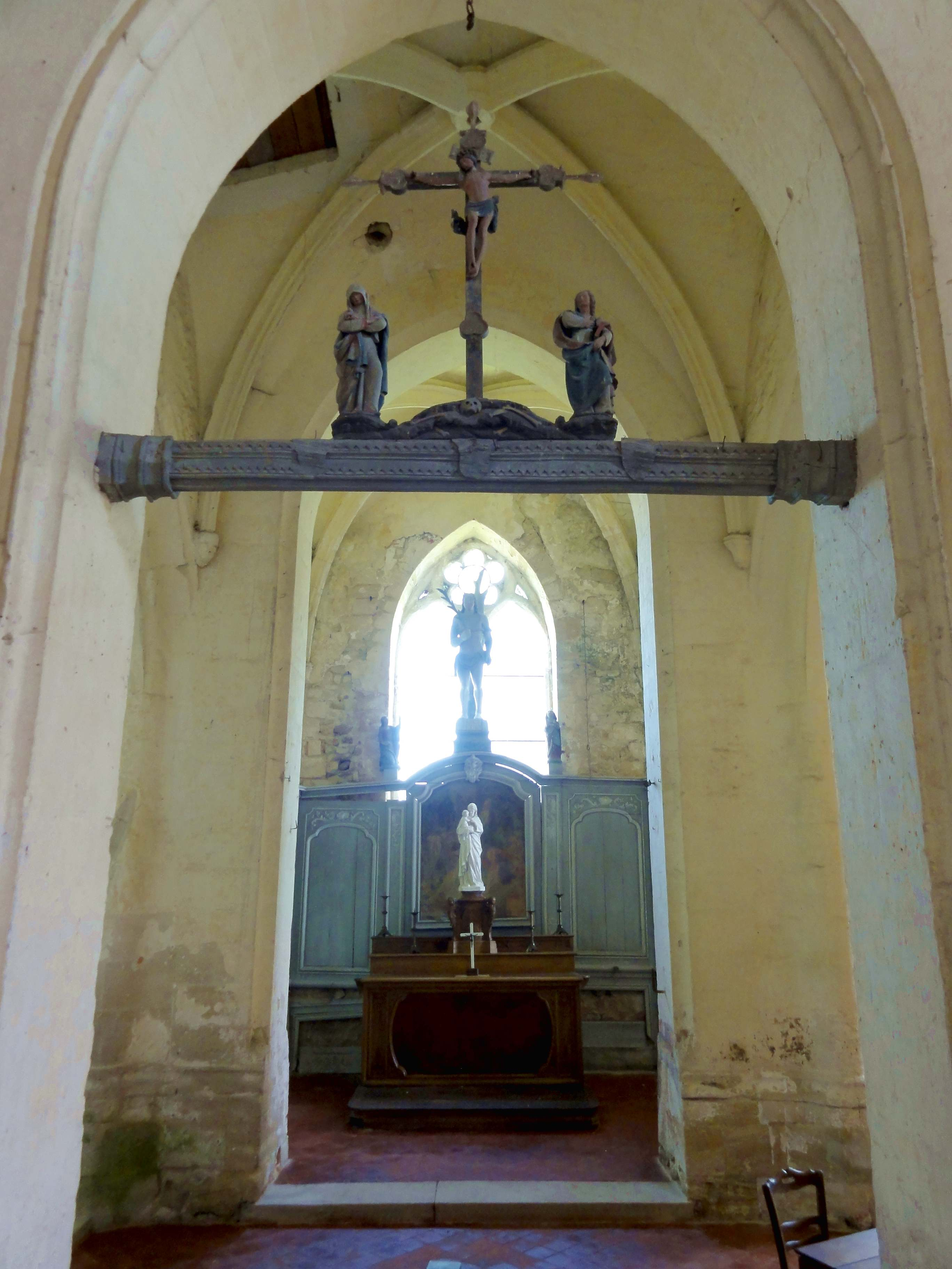 Intérieur de l'église (voir titre).